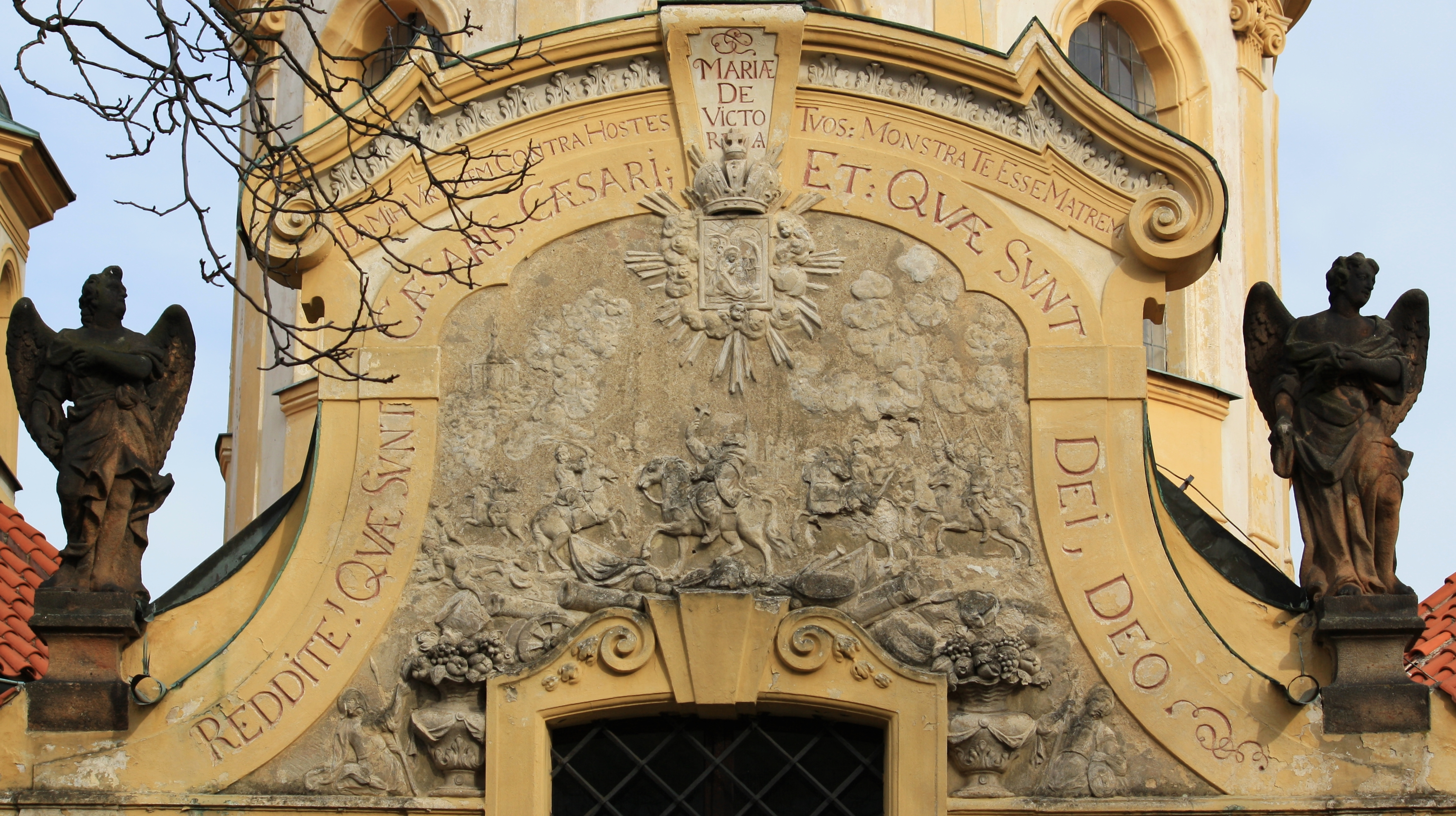 Česky: Praha, Bílá Hora - Kostel Panny Marie Vítězné